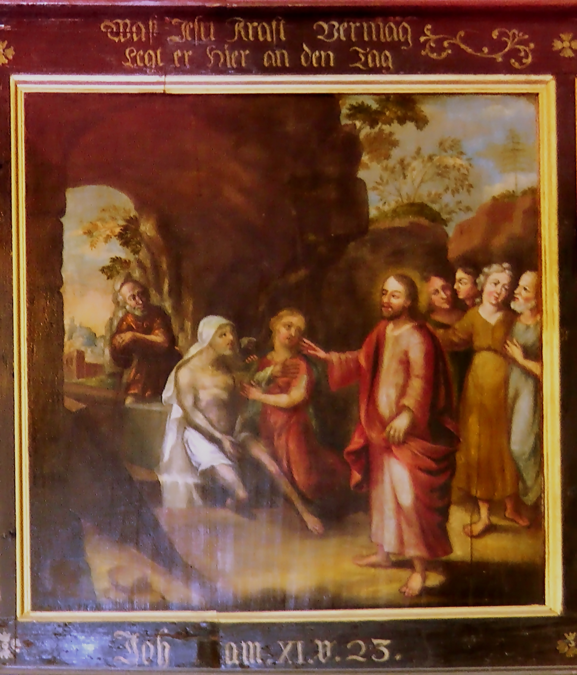 Evangelische Kirche Mülheim Mosel. Tafelbilder des Birkenfelder Hofmalers Johann Georg Engisch